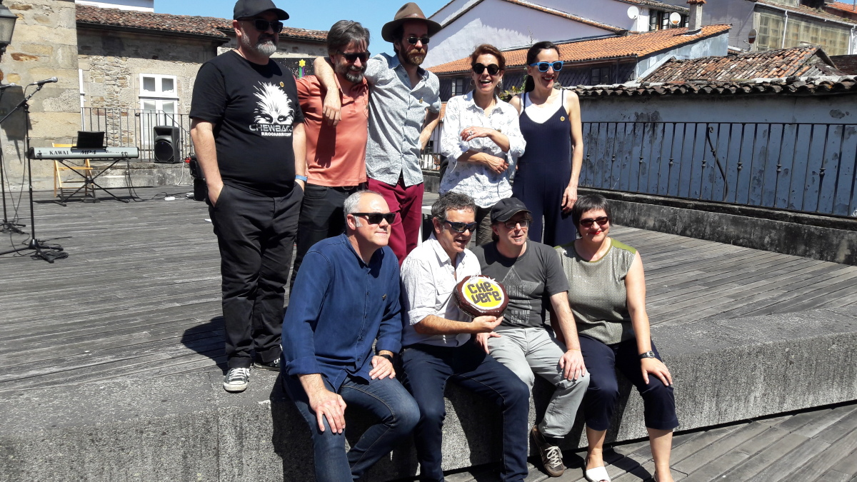 Os e as integrantes de Chévere, na pesentación da programación, en Compostela.